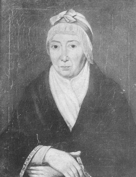 Анны Илларионовна (Семеновна) Голенищева-Кутузова, мать фельдмаршала